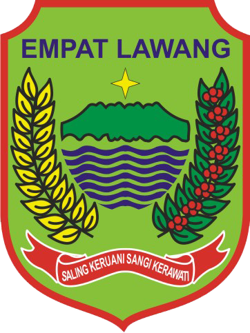 Lambang Kabupaten Empat Lawang